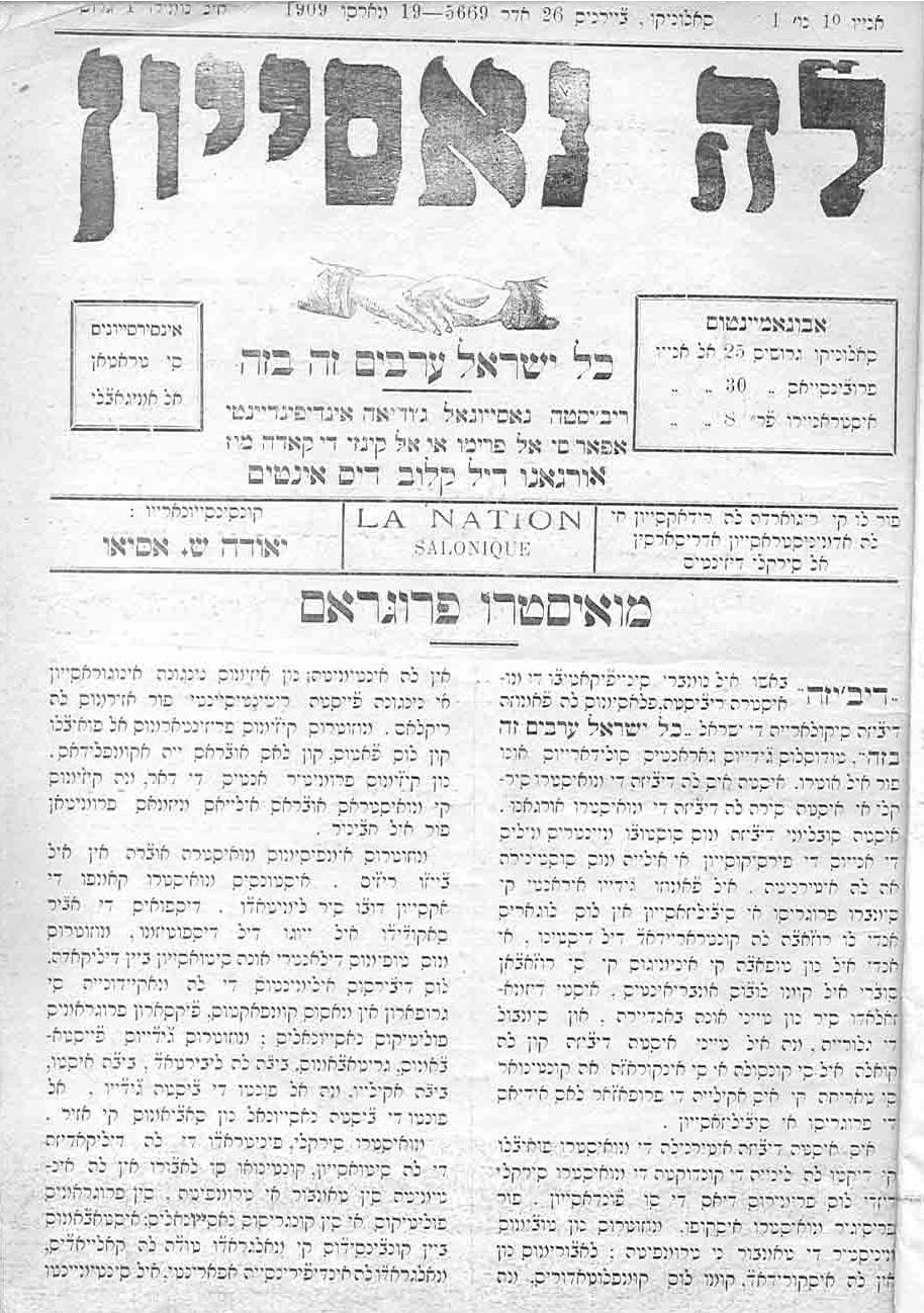 Вестник "Насион"